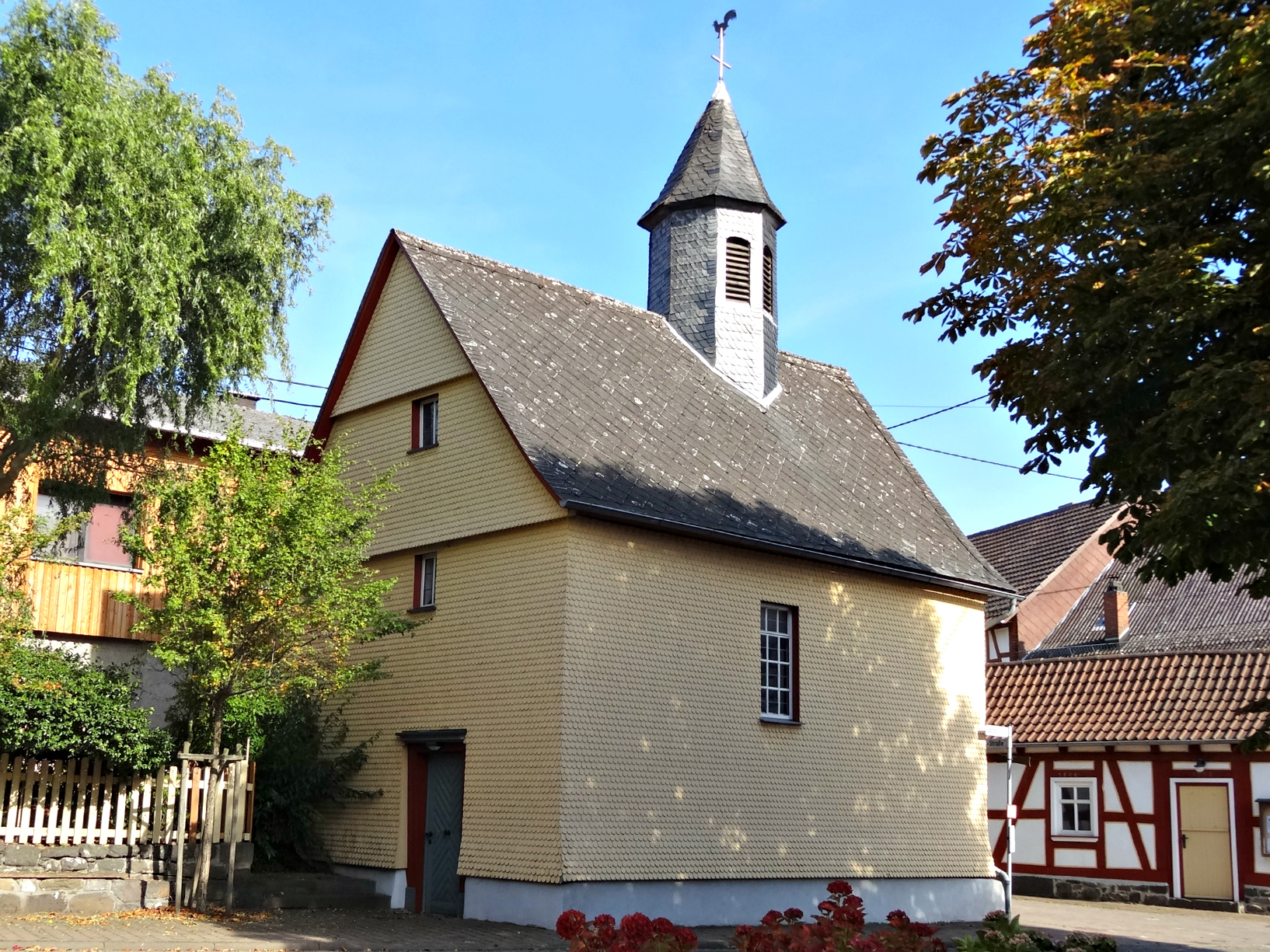 Evangelische Kirche Klein-Eichen